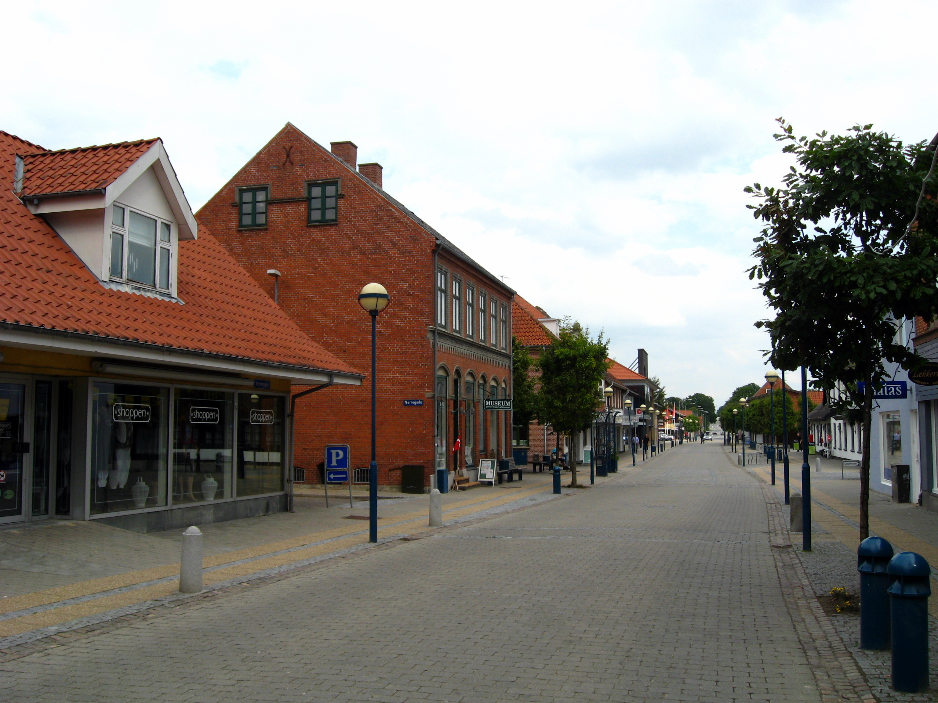 Fjerritslev